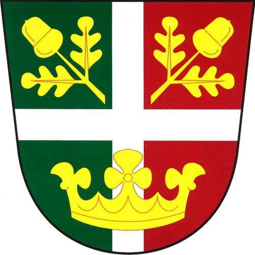 Doubravička znak